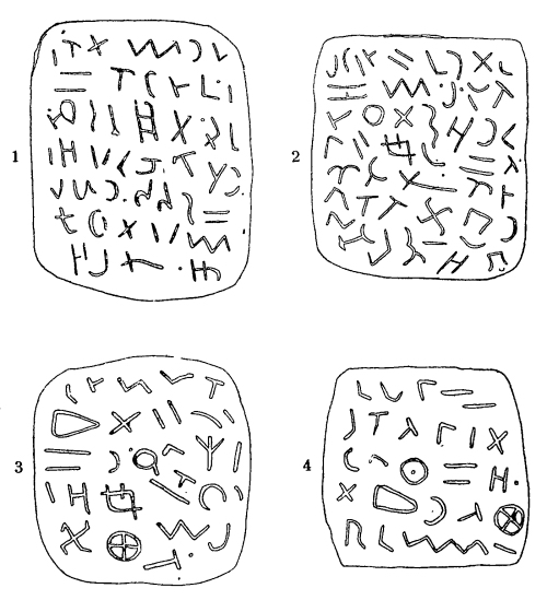 Inscriptions de Glozel